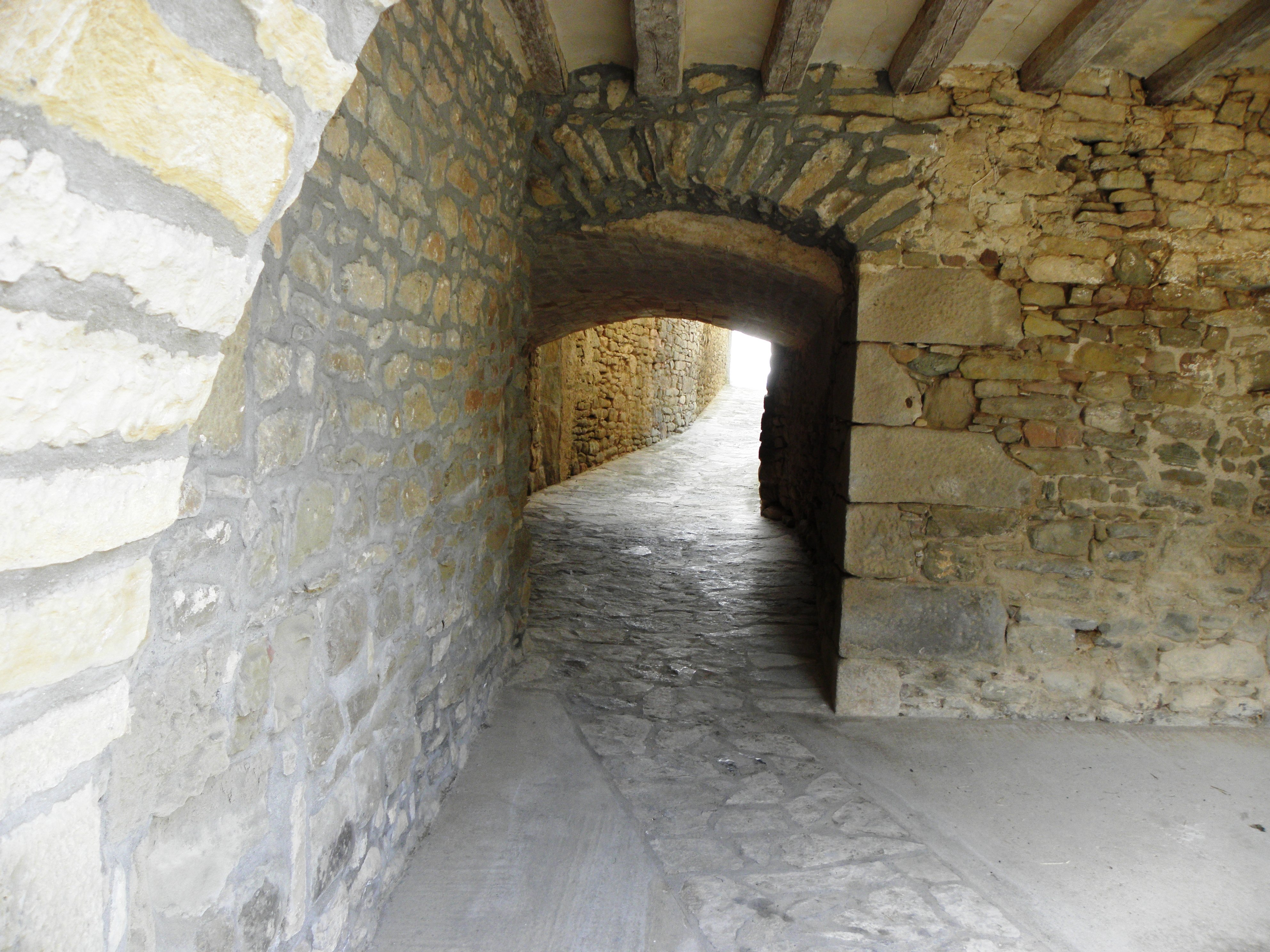 Carrer de Prades de la Molsosa (La Molsosa, Solsonès)